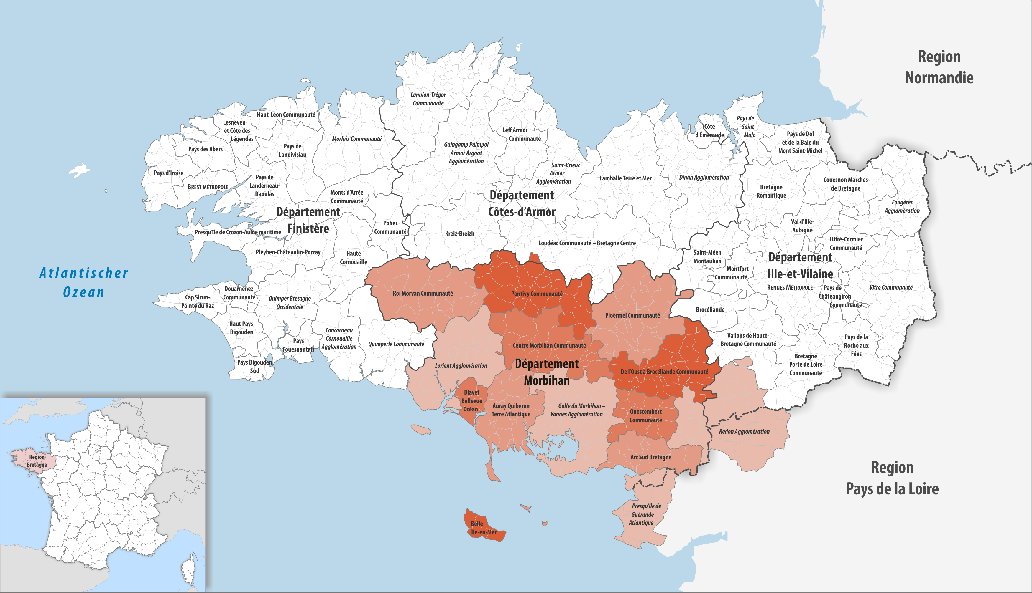 Gemeindeverbände im Département Morbihan